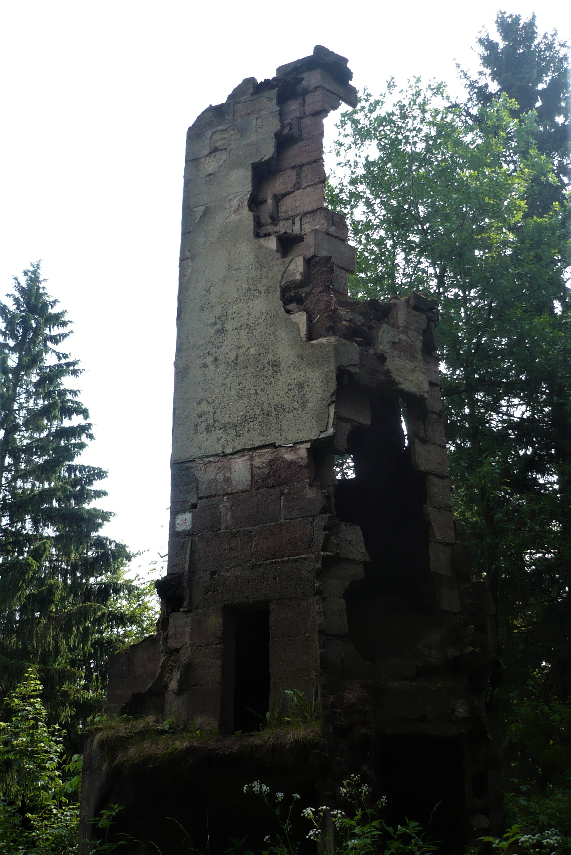 Włodzicka Góra